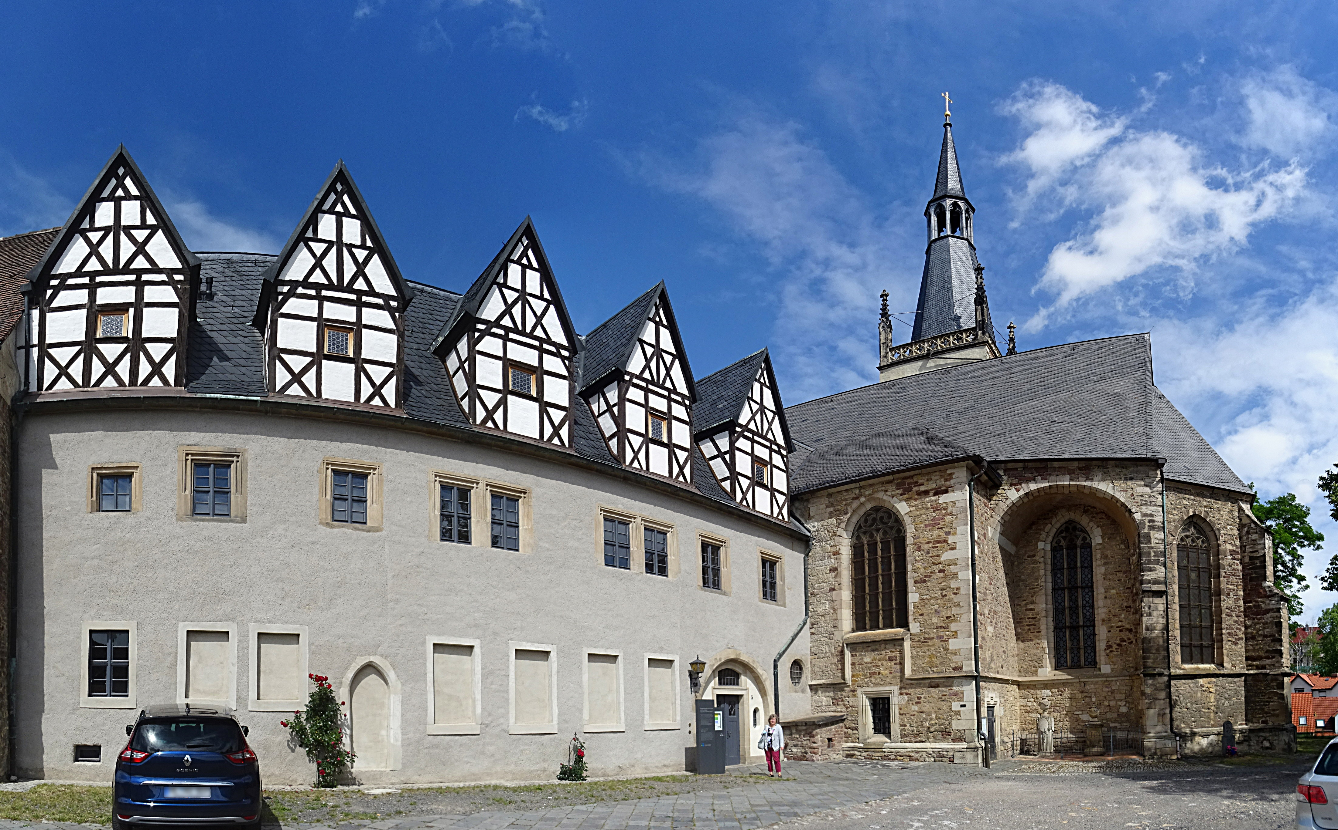 St. Annenkirche (Eisleben) von Osten mit Klausurflügel des ehemaligen Klosters